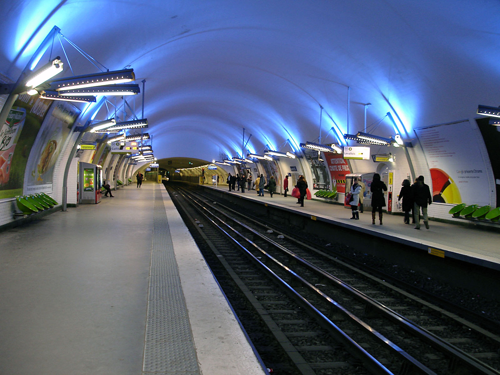 La station Gambetta de la ligne 3 du métro de Paris, France. On distingue au fond l'ancienne station Martin Nadaud.